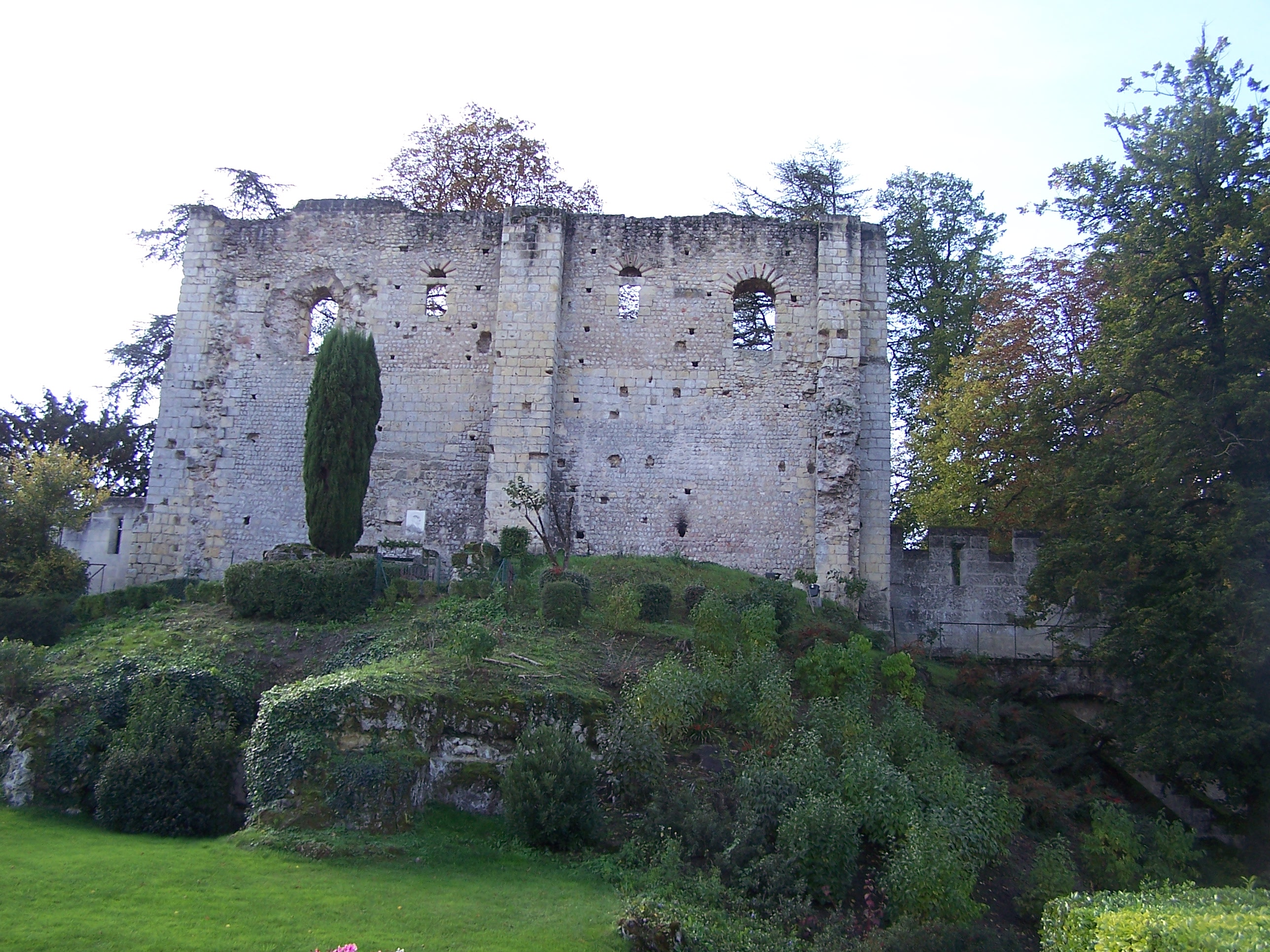 Château de Langeais.(Indre-et-Loire). Assises en arête-de-poisson dans la partie basse de la muraille.